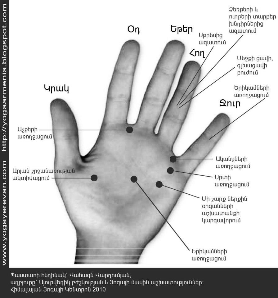 սա ձեռքի կենսաակտիվ կետերից մի քանիսի մասին ուղեցույց-պաստառ է, ստեղծված Վահագն Վարդումյանի կողմից (Հիմալայան Յոգայի Կենտրոն, Երևան, Հայաստան)